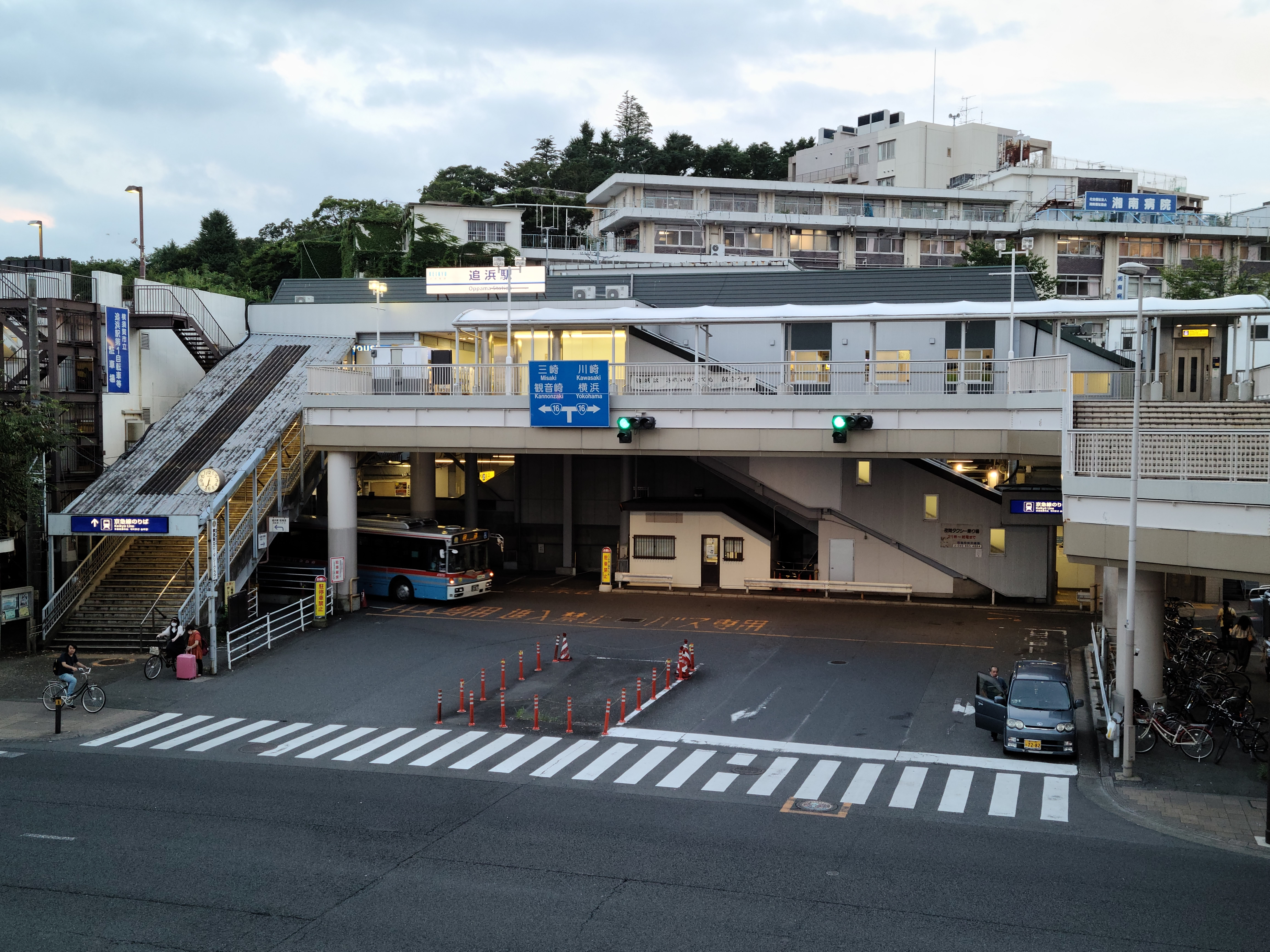 駅舎です。